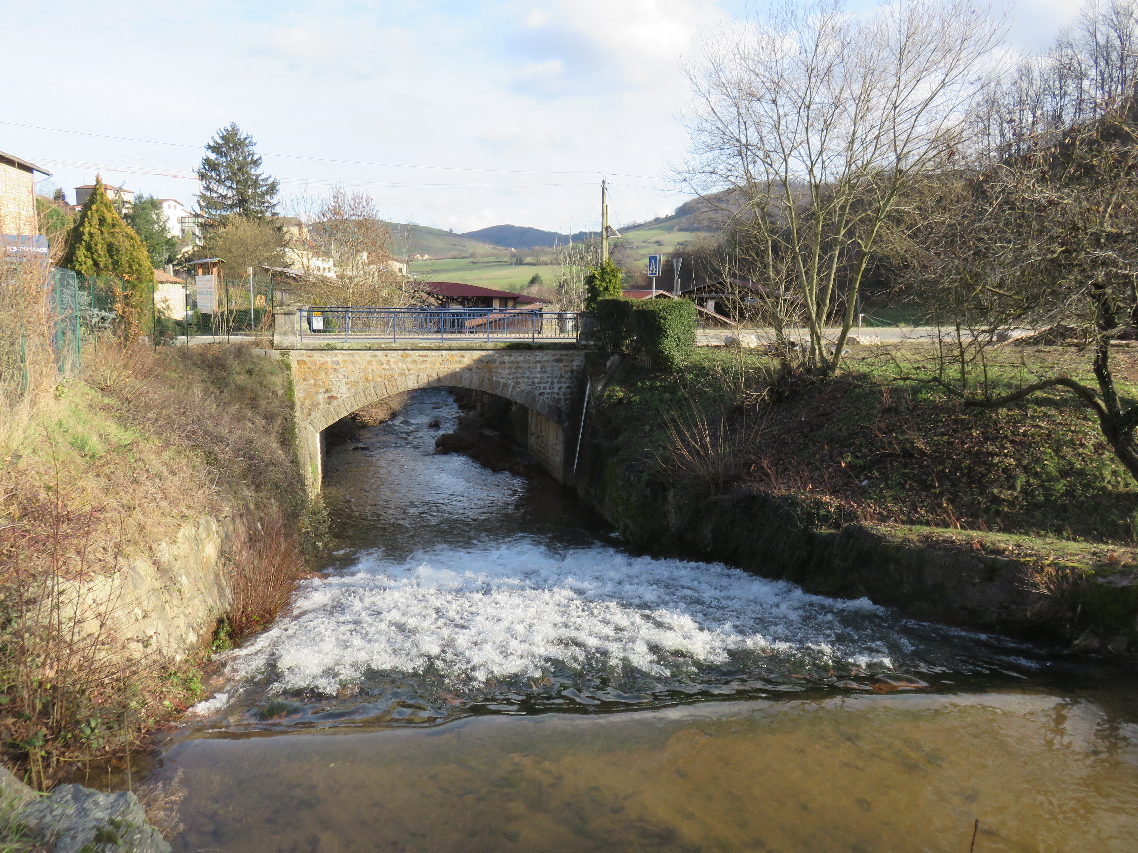 Vue du Torranchin à Saint-Forgeux (Rhône, France).